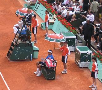 abritre et ramasseurs de balle, Roland Garros 2006